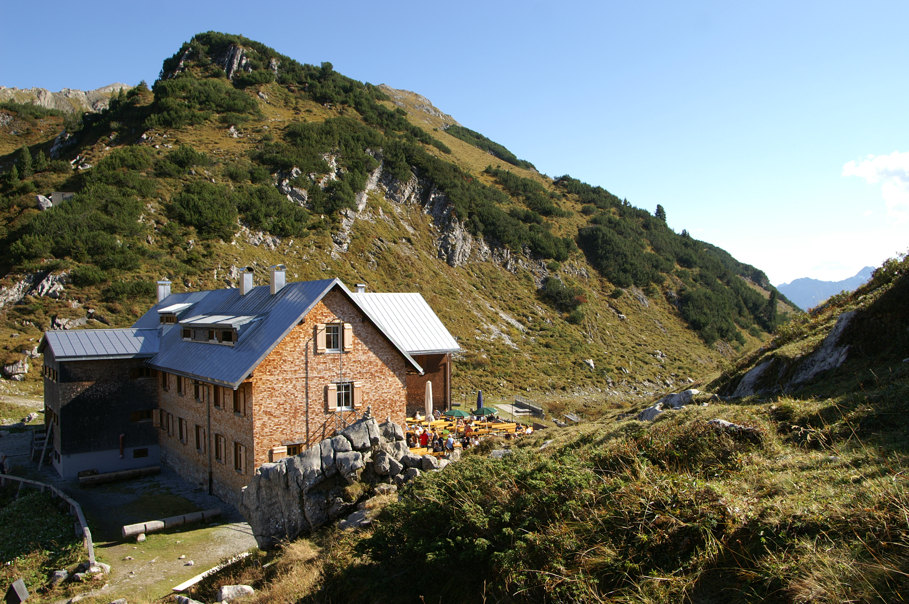 die Freiburger Hütte im Sommer 2007 am Formarinsee im Lechquellengebirge am Fusse der Roten Wand in Vorarlberg.